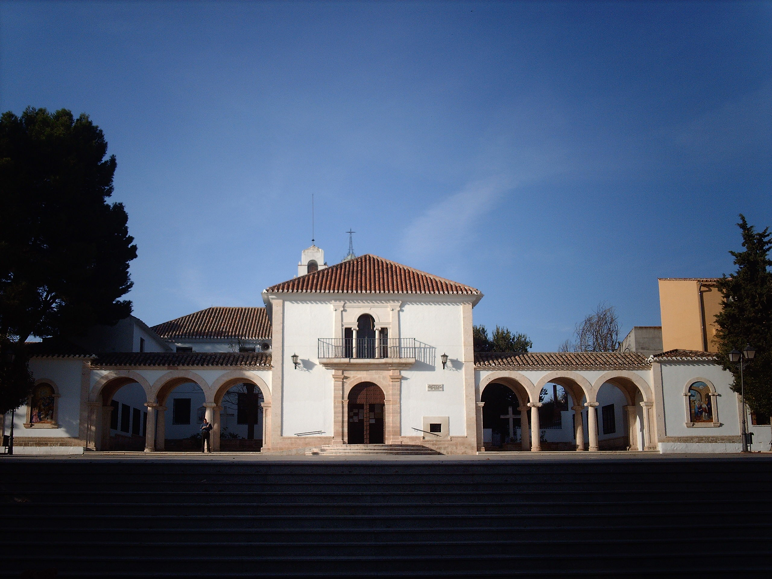 Ermita de la Virgen de la Caridad, patrona de Villarrobledo